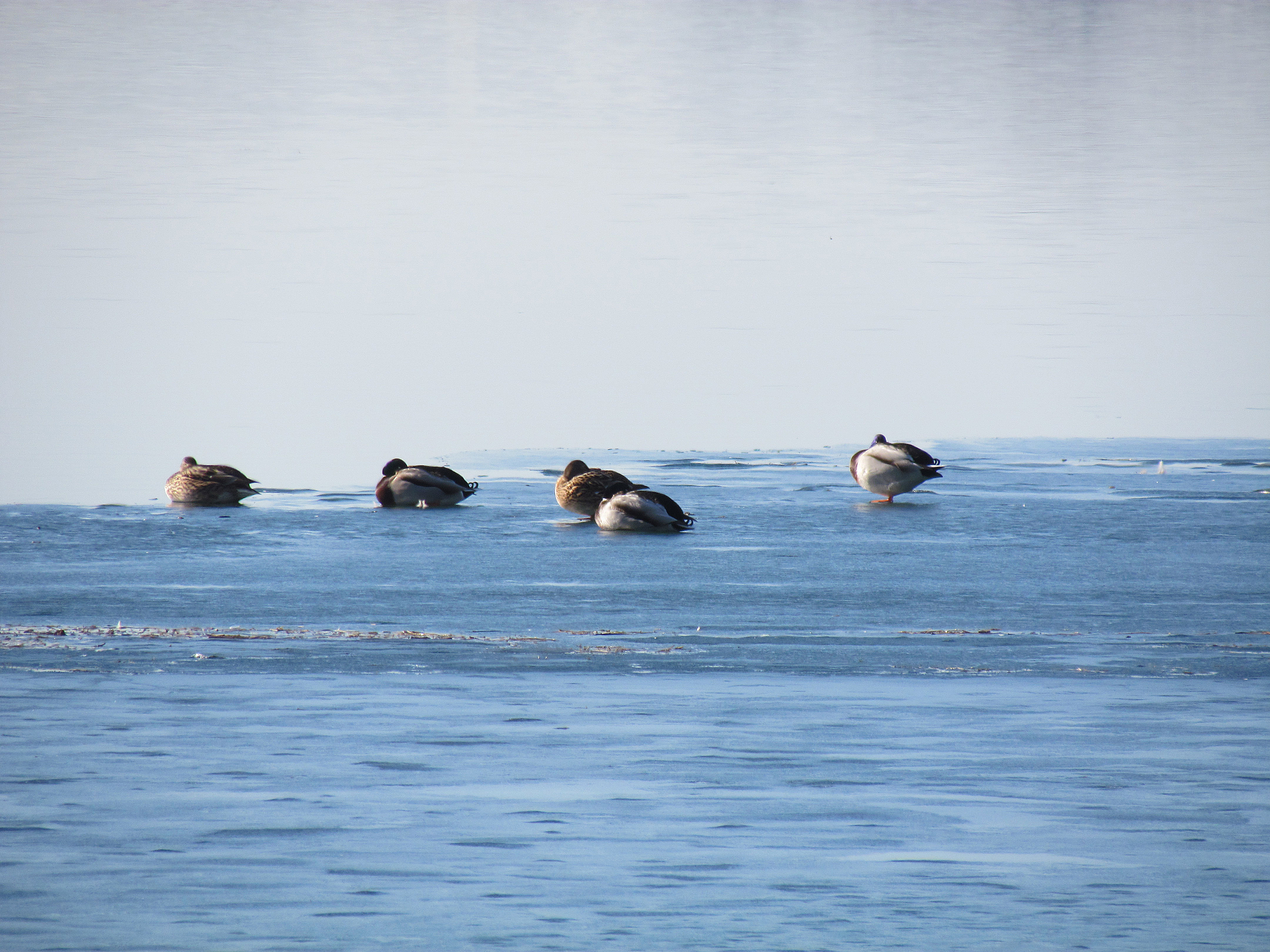 Дивље патке на залеђеном Савском језеру (фото: Михаило Грбић)